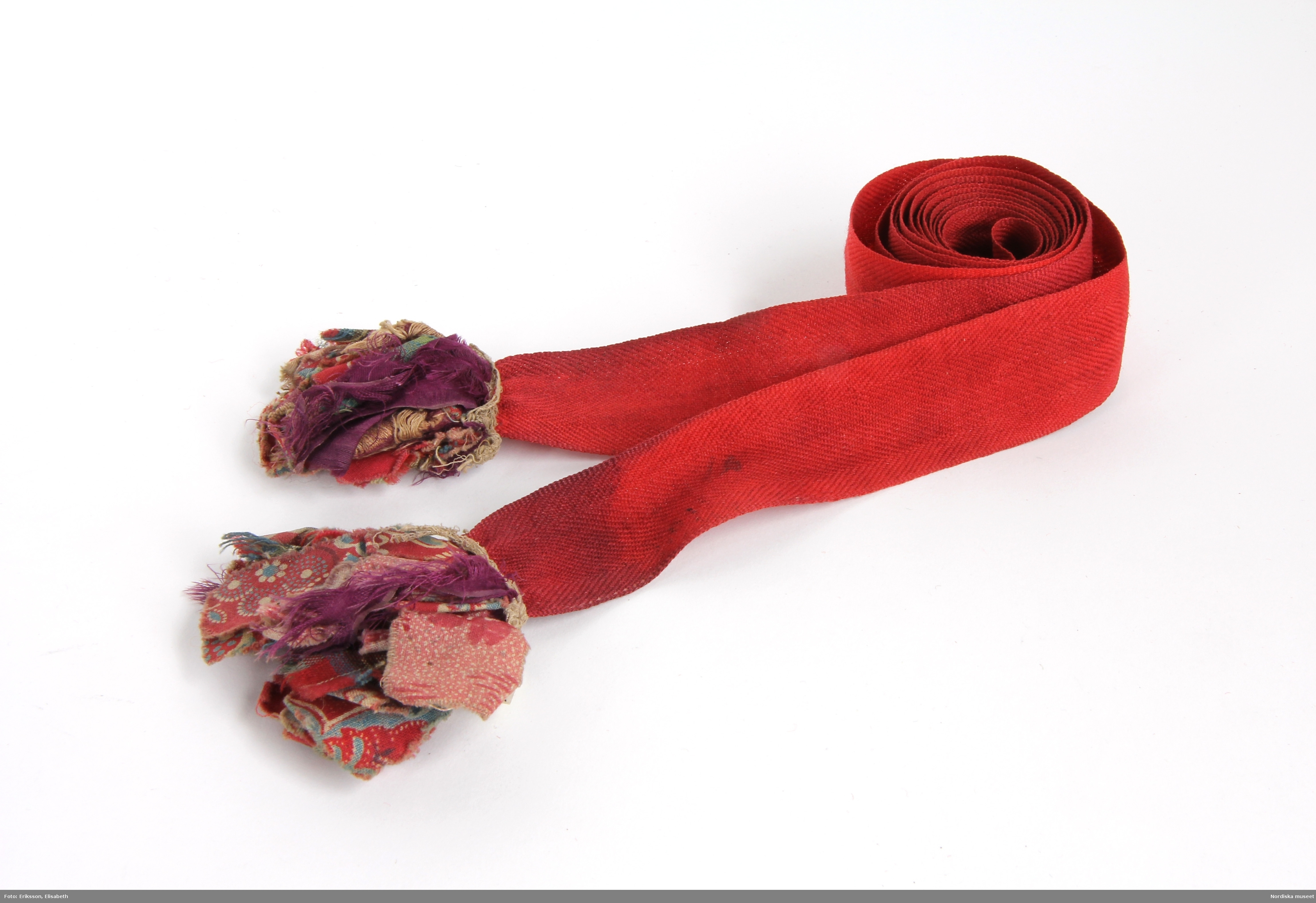 Förklädesband